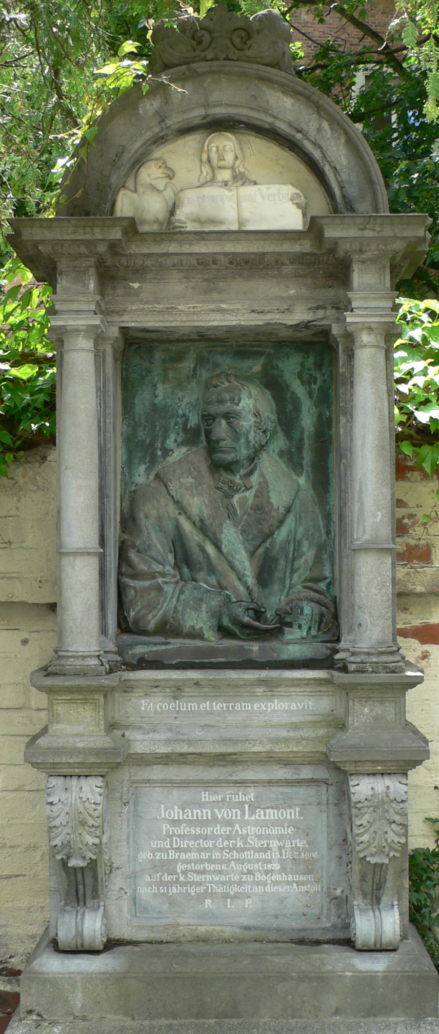 Tomb of Johann von Lamont at St. Georg München-Bogenhausen